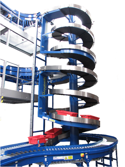 spiral conveyor